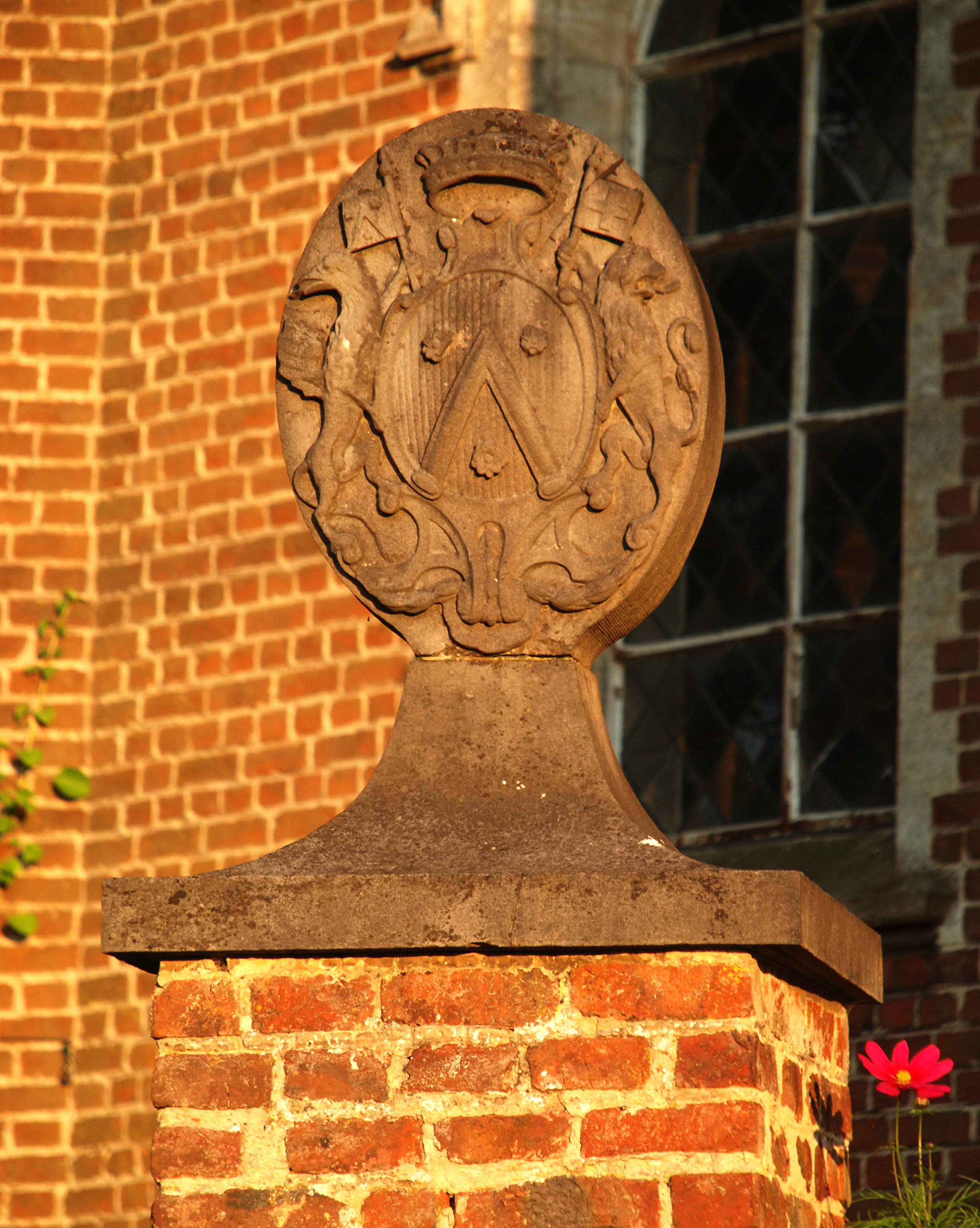 Belgique - Brabant wallon - Genappe - Loupoigne - Chapelle Notre-Dame de Foy